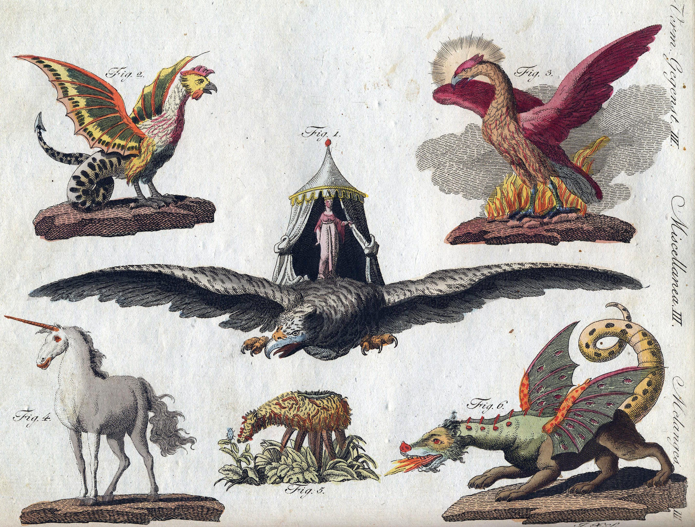 Friedrich Justin Bertuch, Bilderbuch für Kinder, 1790-1830 (Eigenbesitz), Fabelwesen. p 175, 176